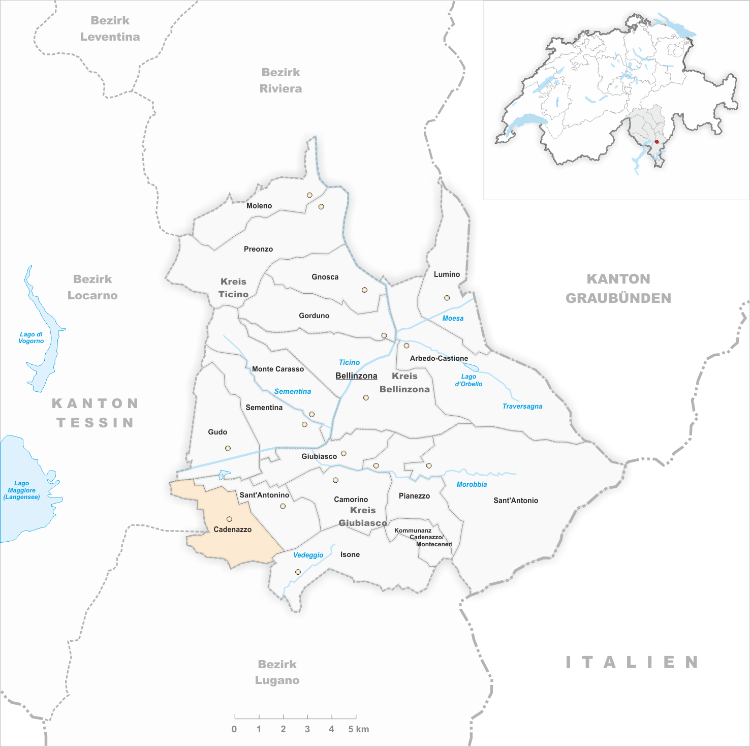 Municipality Cadenazzo